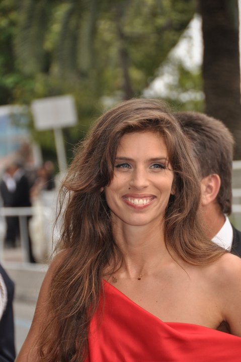 Maïwenn Le Besco au festival de Cannes